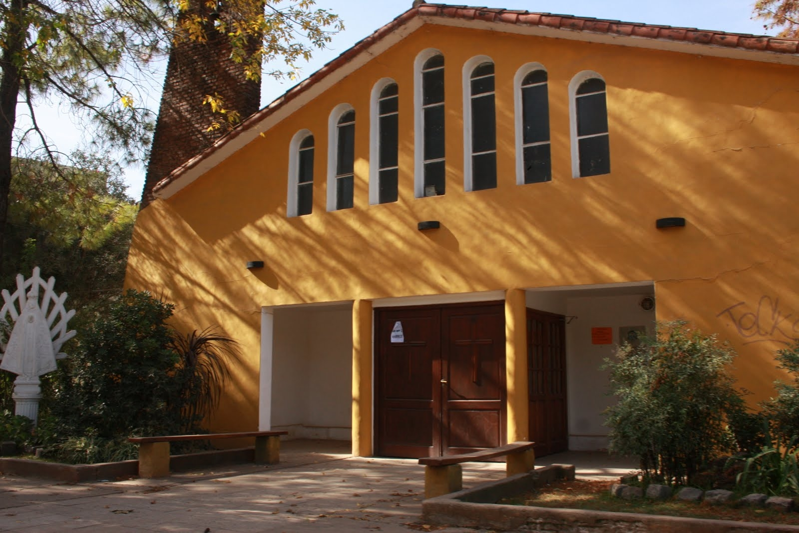 Parroquia Nuestra Señora de Luján y San José Obrero, Zelaya Provincia de Buenos Aires.